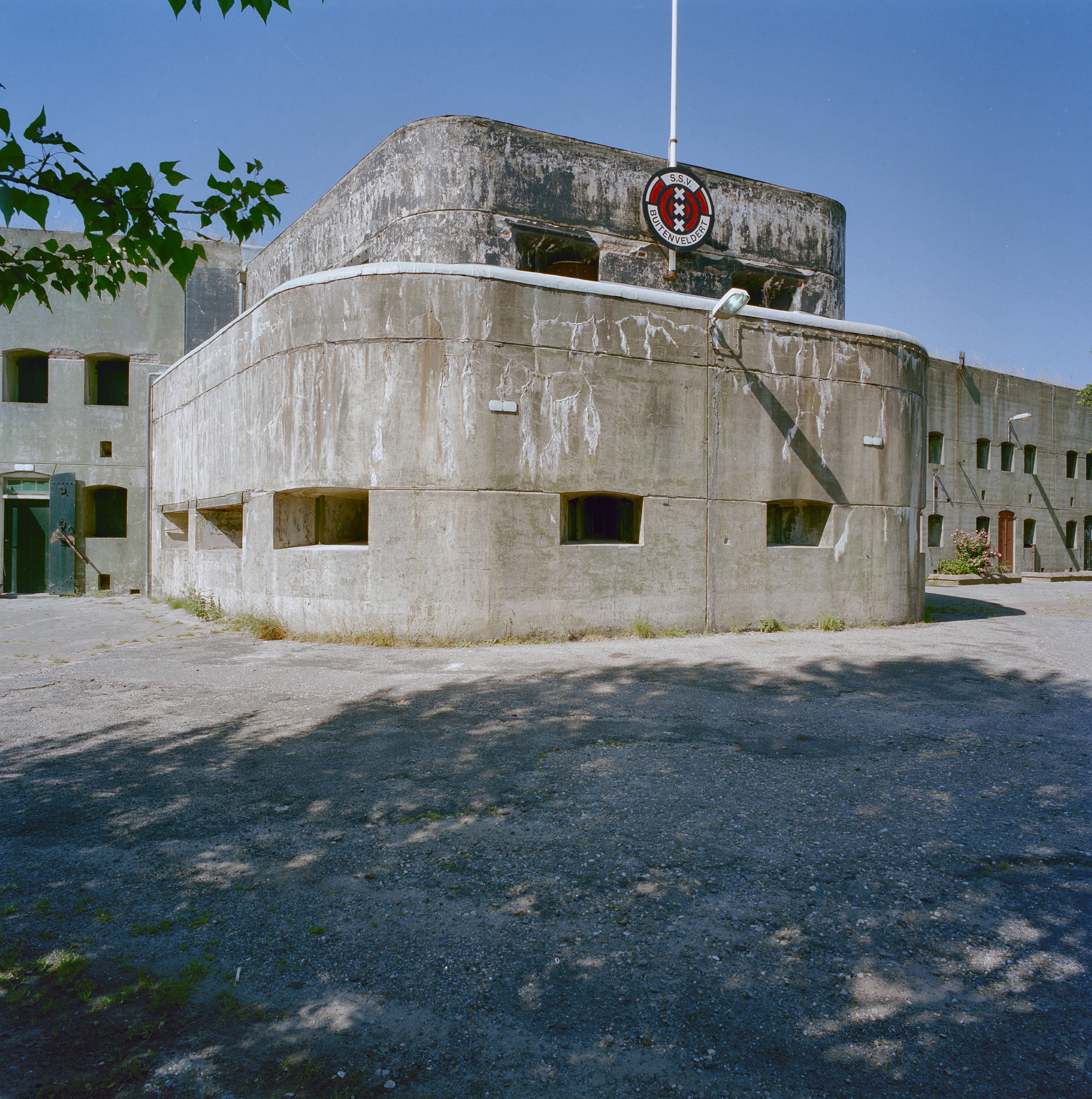 Fort bij Hoofddorp: Keelzijde van het hoofdgebouw